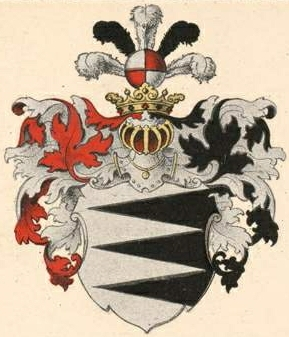 Minckwitzi suguvõsa aadlivapp